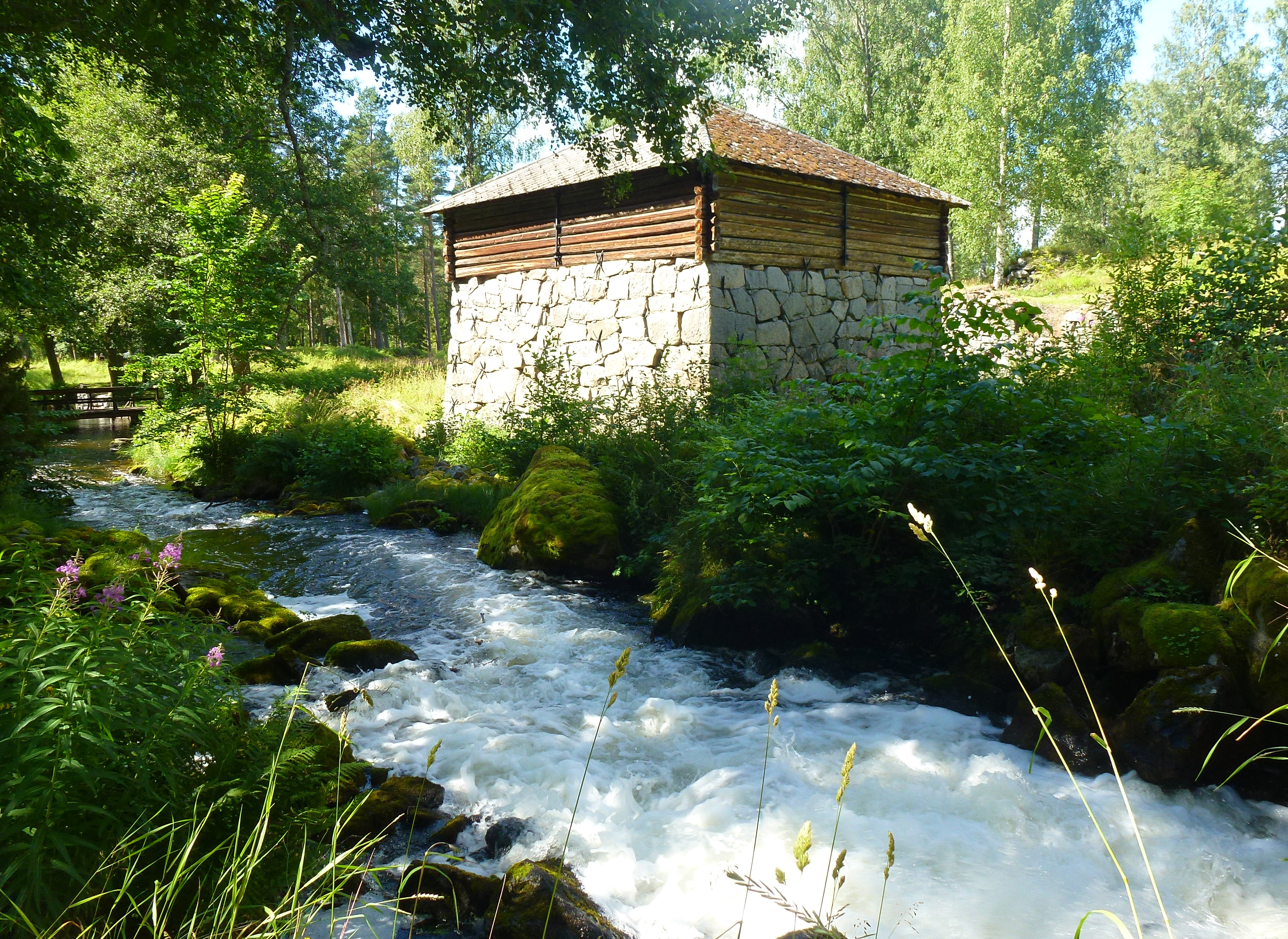 Silfhytteå bruk, masugnen